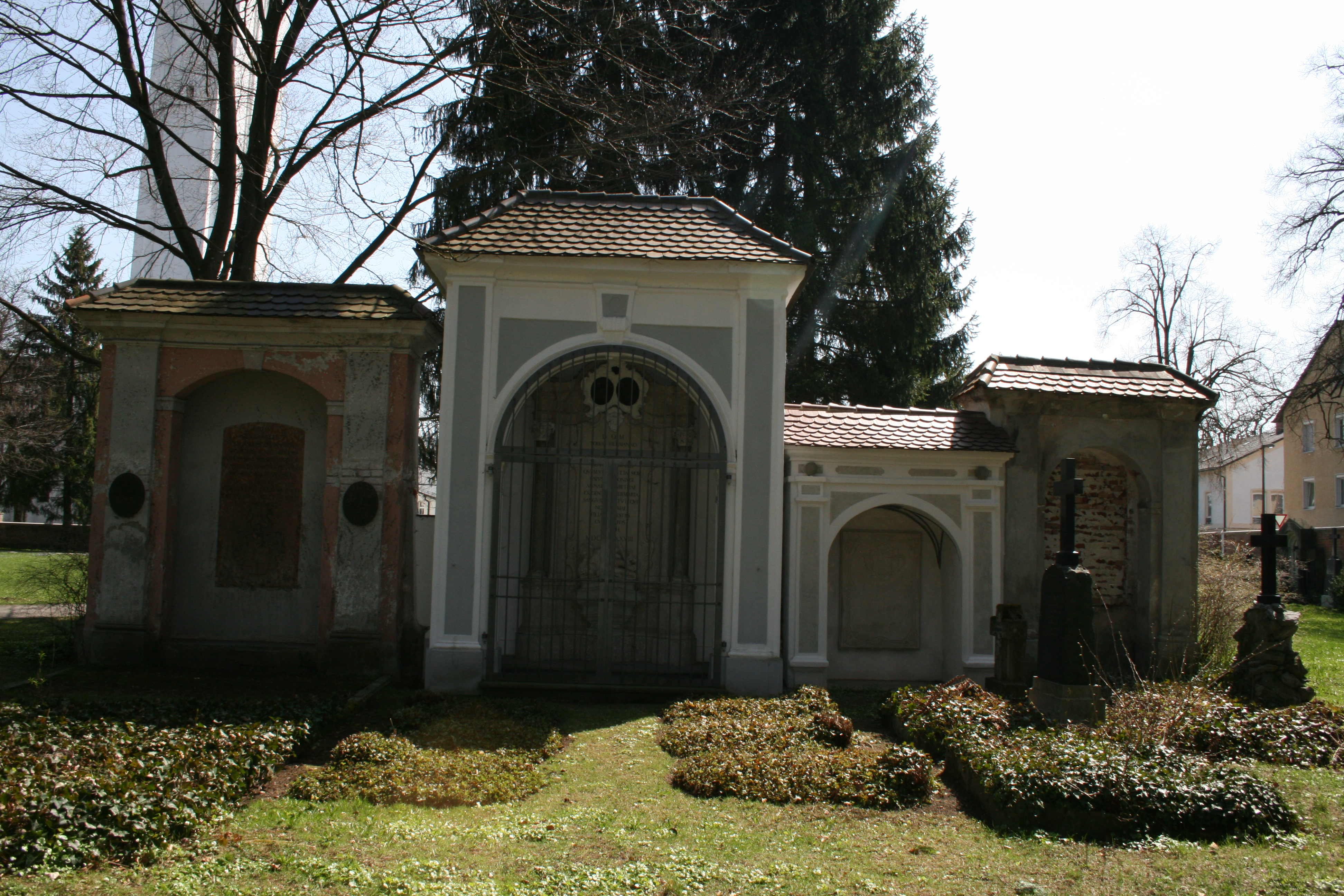 Alter Friedhof, Memmingen